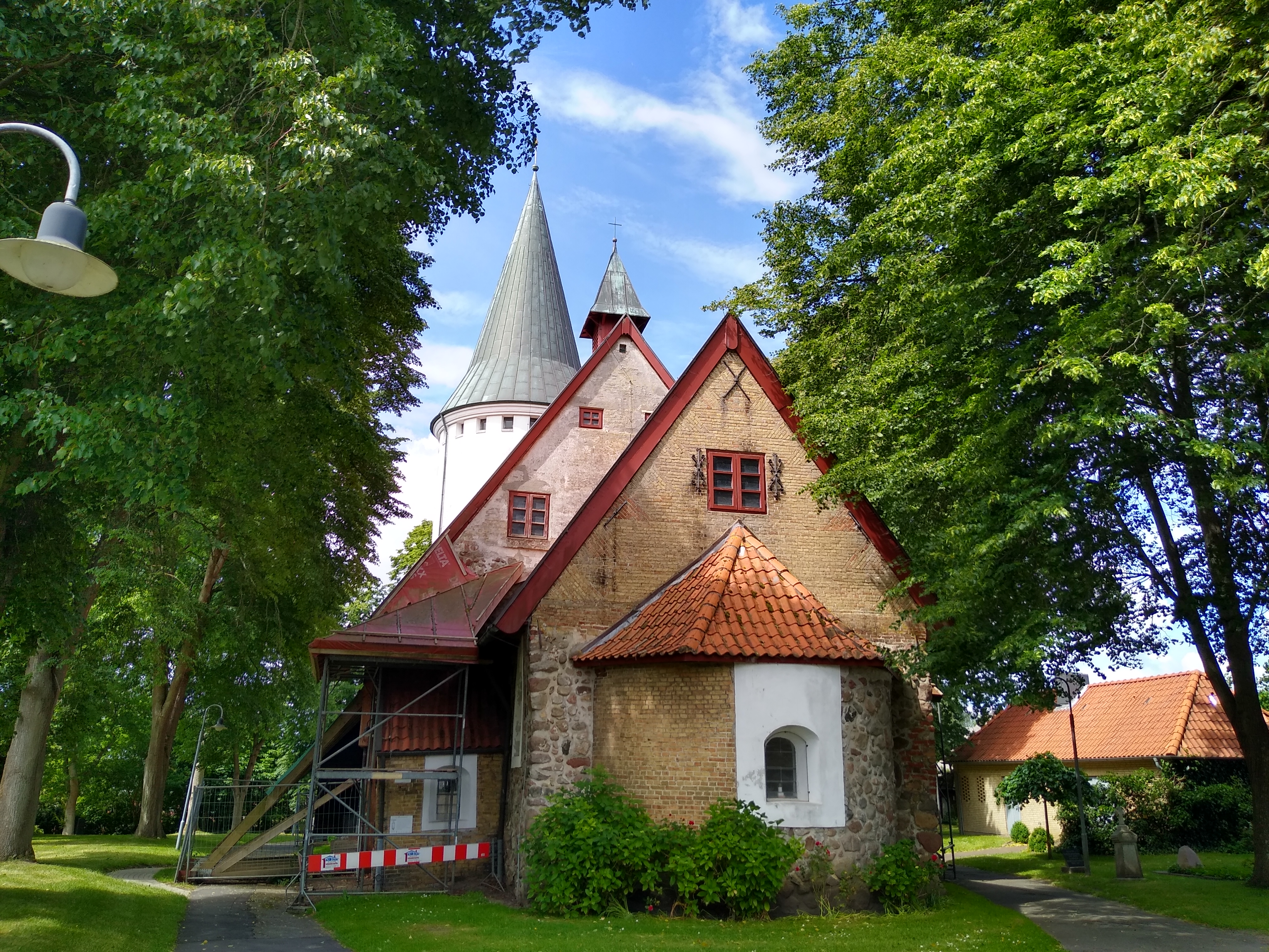 Die Katharinenkirchen Süderstapel 2020 von Osten gesehen - Zustand 2020